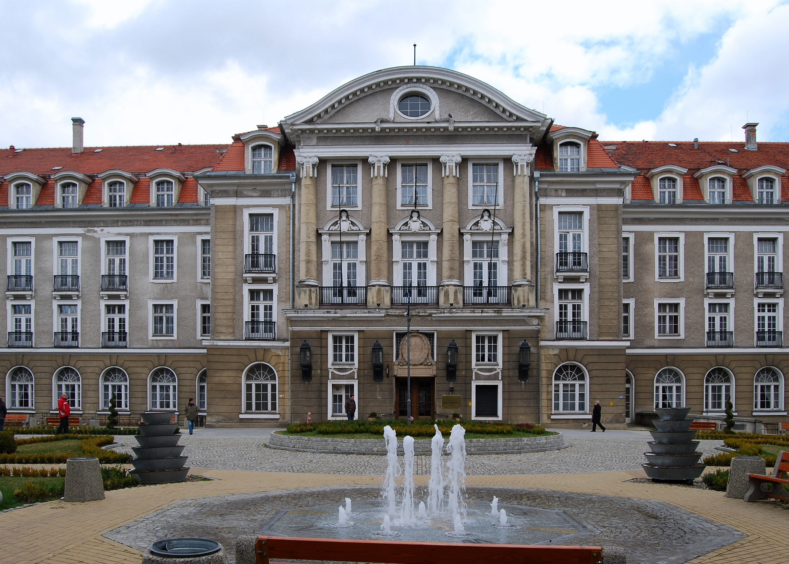 hotel zdrojowy „Grand Hotel”, ob. sanatorium „Dom Zdrojowy” Szczawno-Zdrój, ul. Kolejowa 14